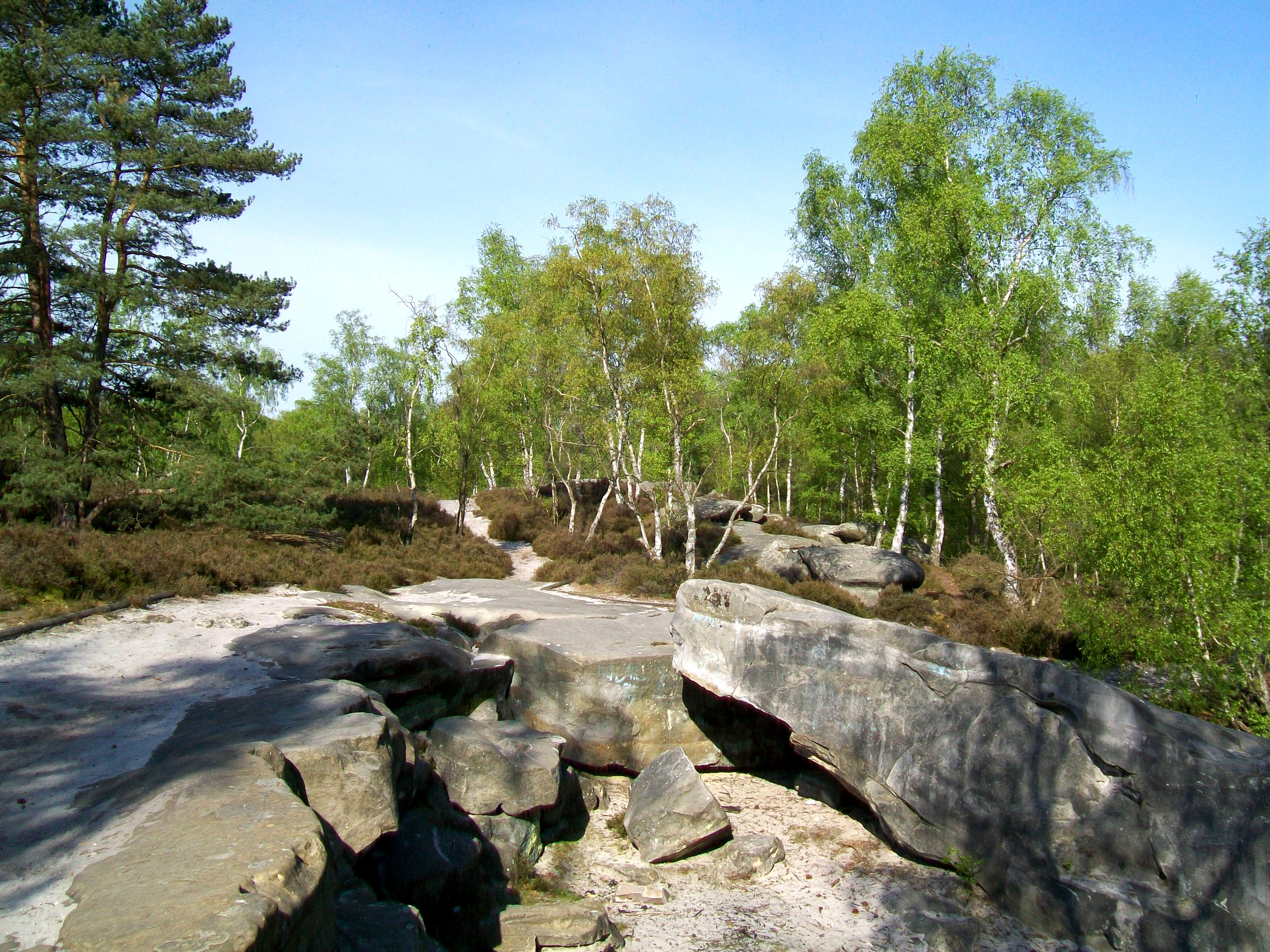 Chaos de grès sur le site de la Pierre Glissoire.